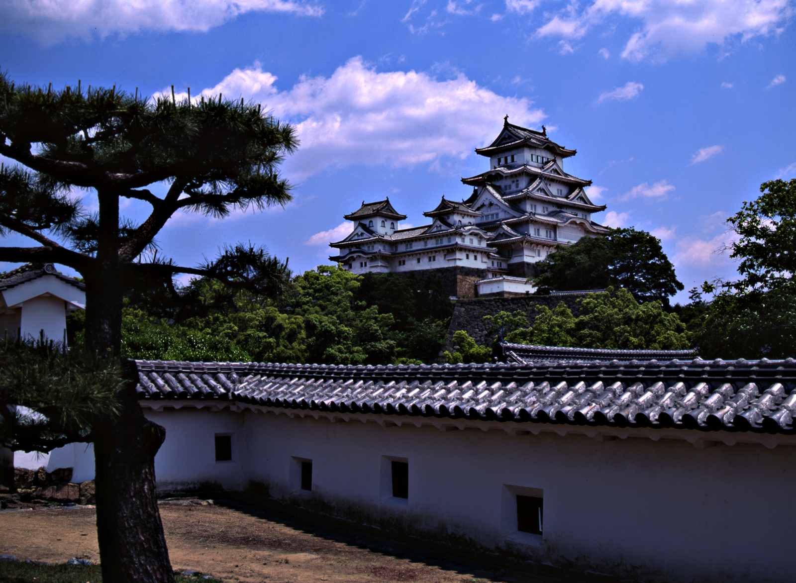 Zelfgemaakte media (gescande 4,5 x 6 dia)